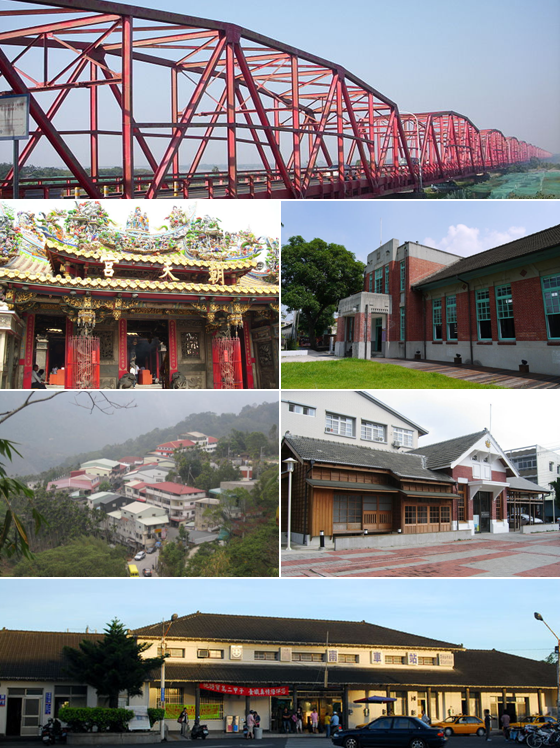 雲林縣的蒙太奇